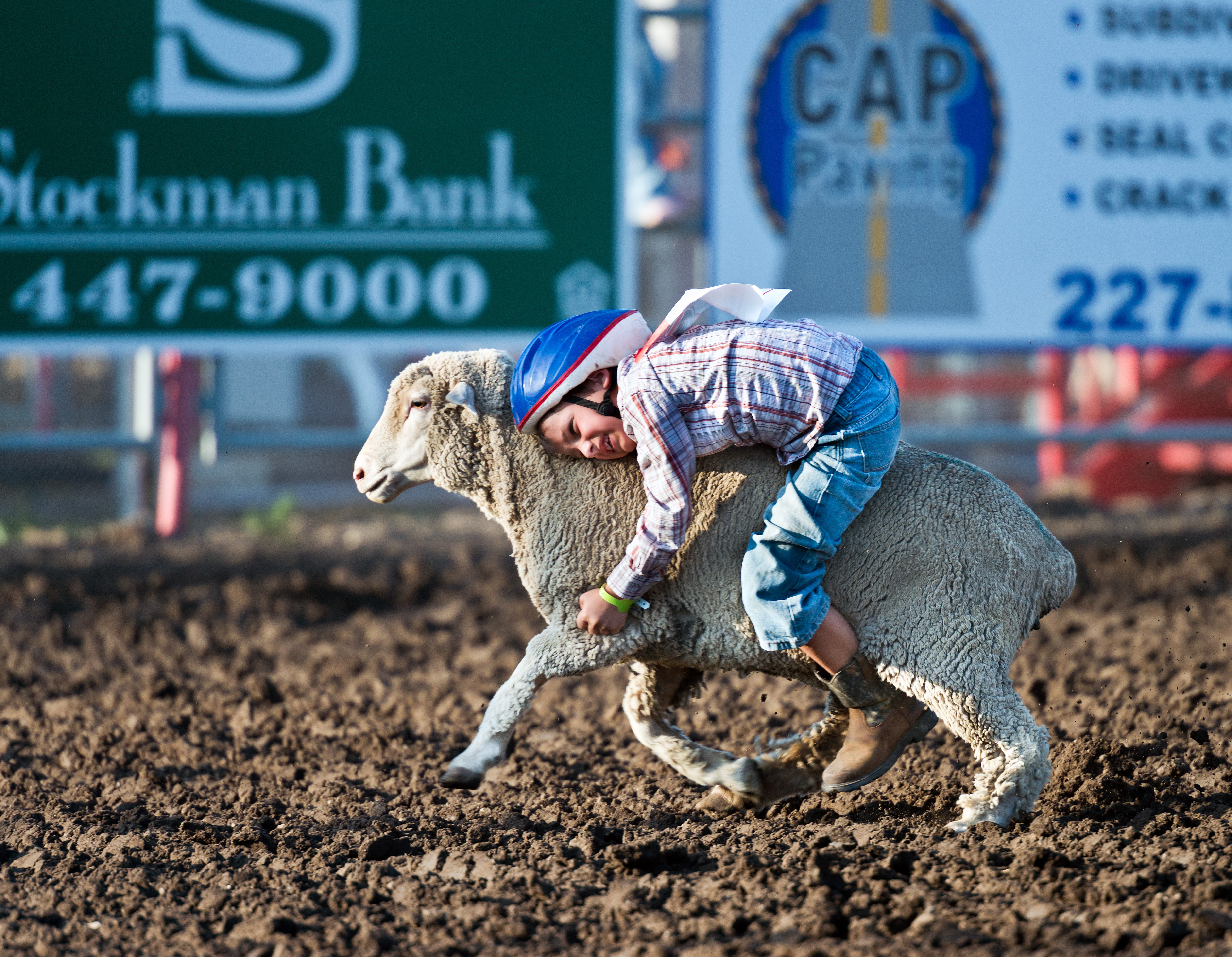 Mutton Bustin